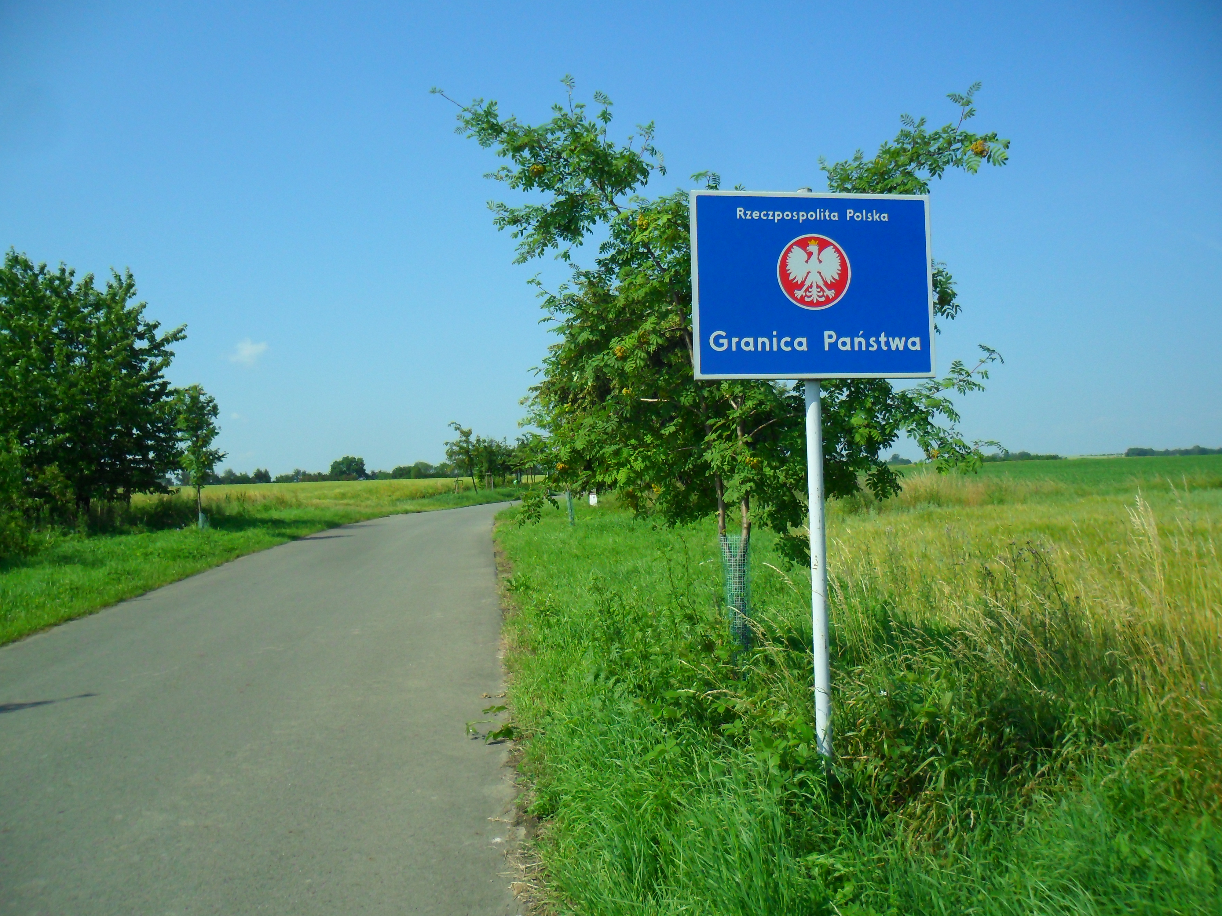 Przejście graniczne Krzanowice–Strahovice — tablica informacyjna „Granica Państwa“